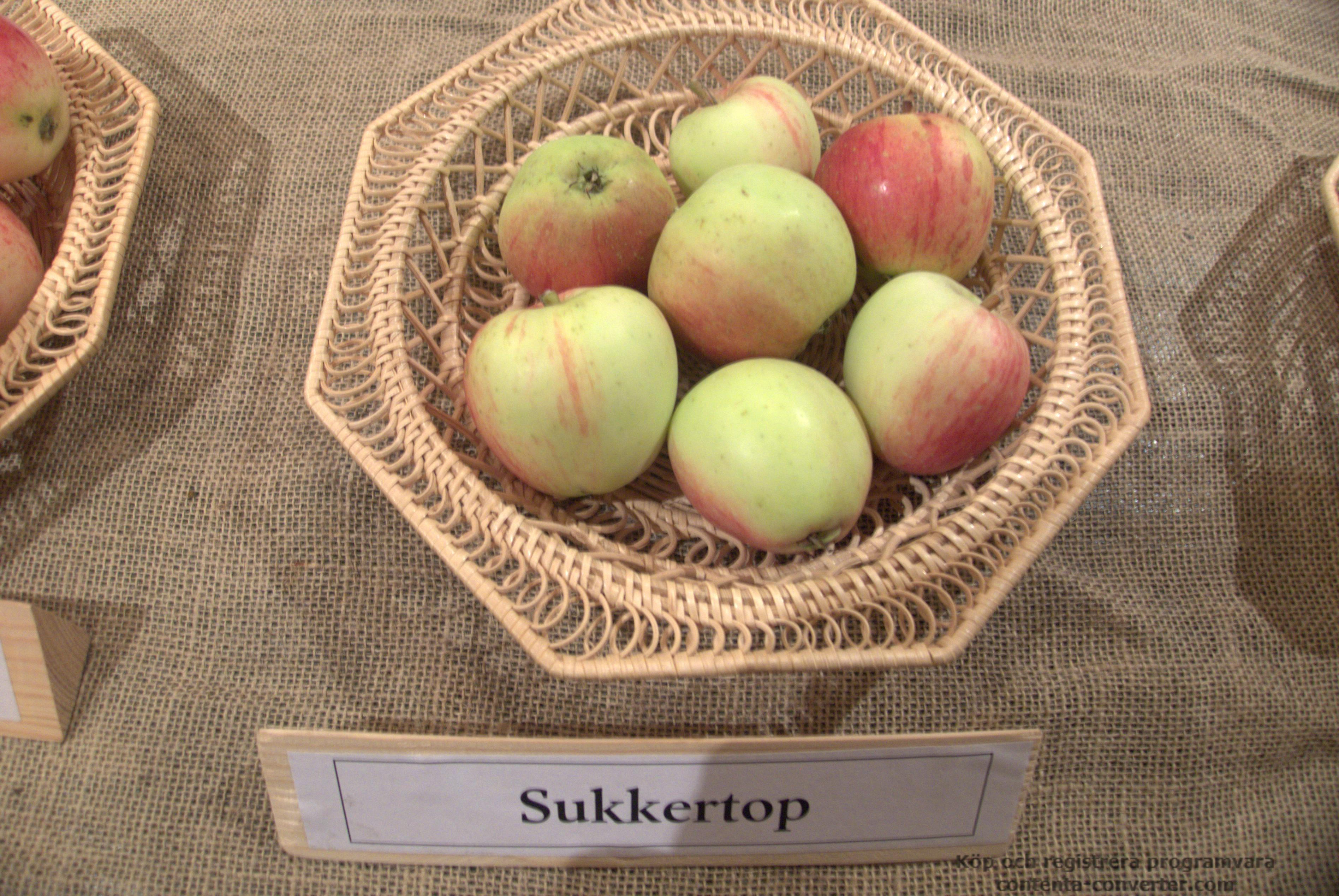 Äpplen av sorten Sukkertop